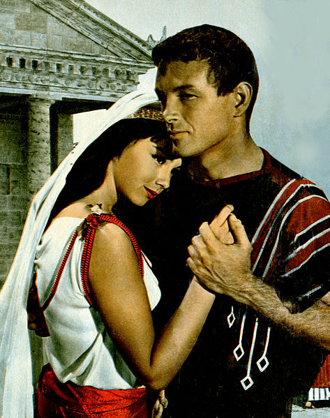 foto di scena film Nel segno di Roma